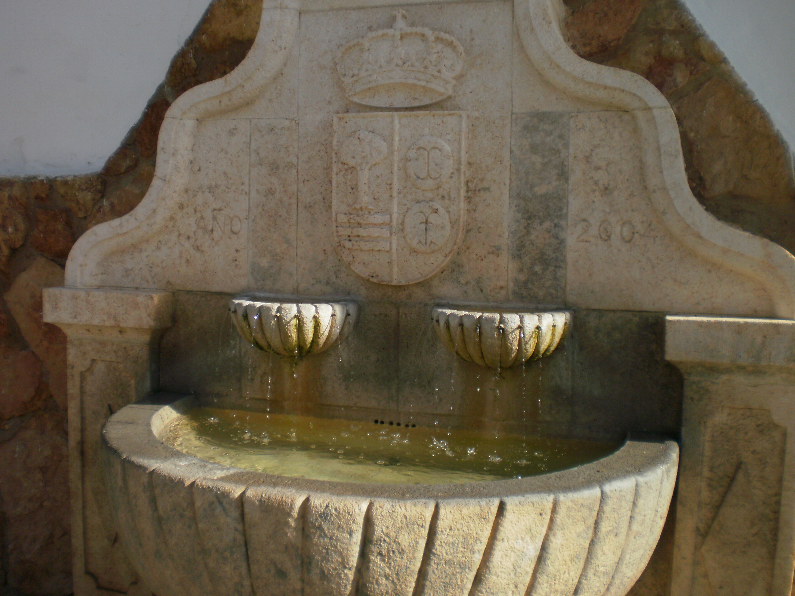 Chillaron de Cuenca herria, Gaztela La Mantxa.